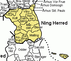 Kort over Ning Herred, Århus Amt